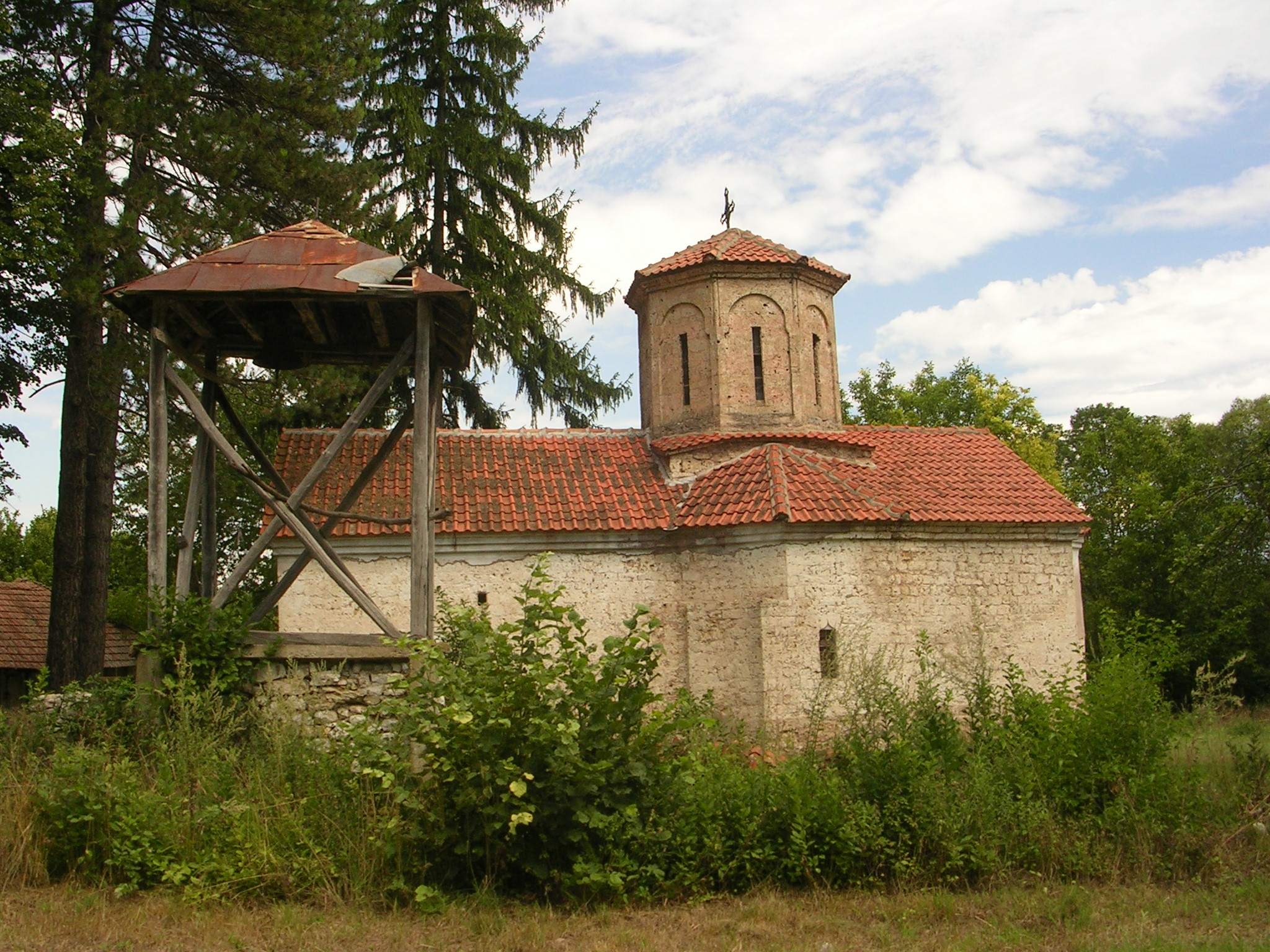 Spomenik kulture